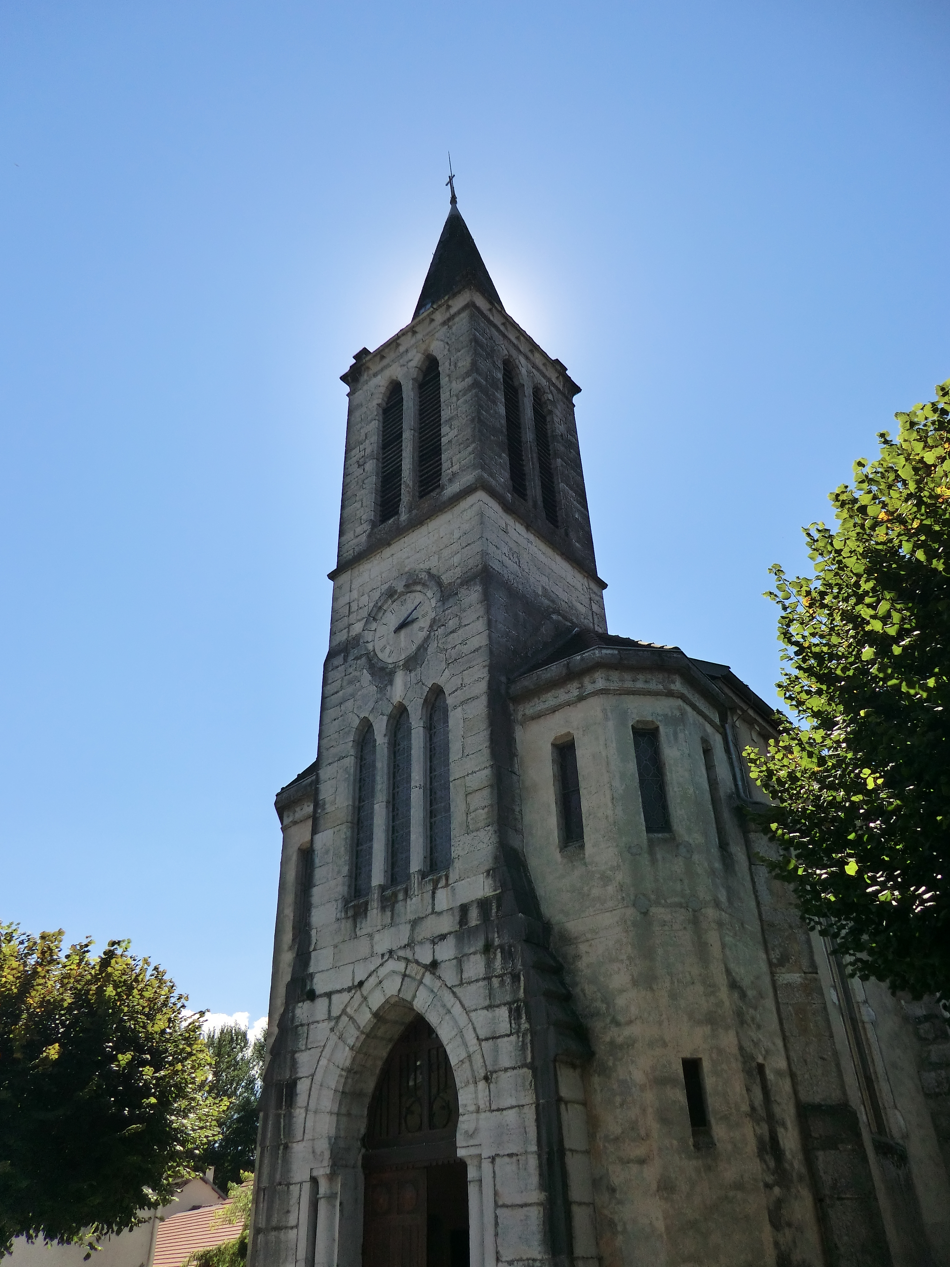 L'église de Bons.